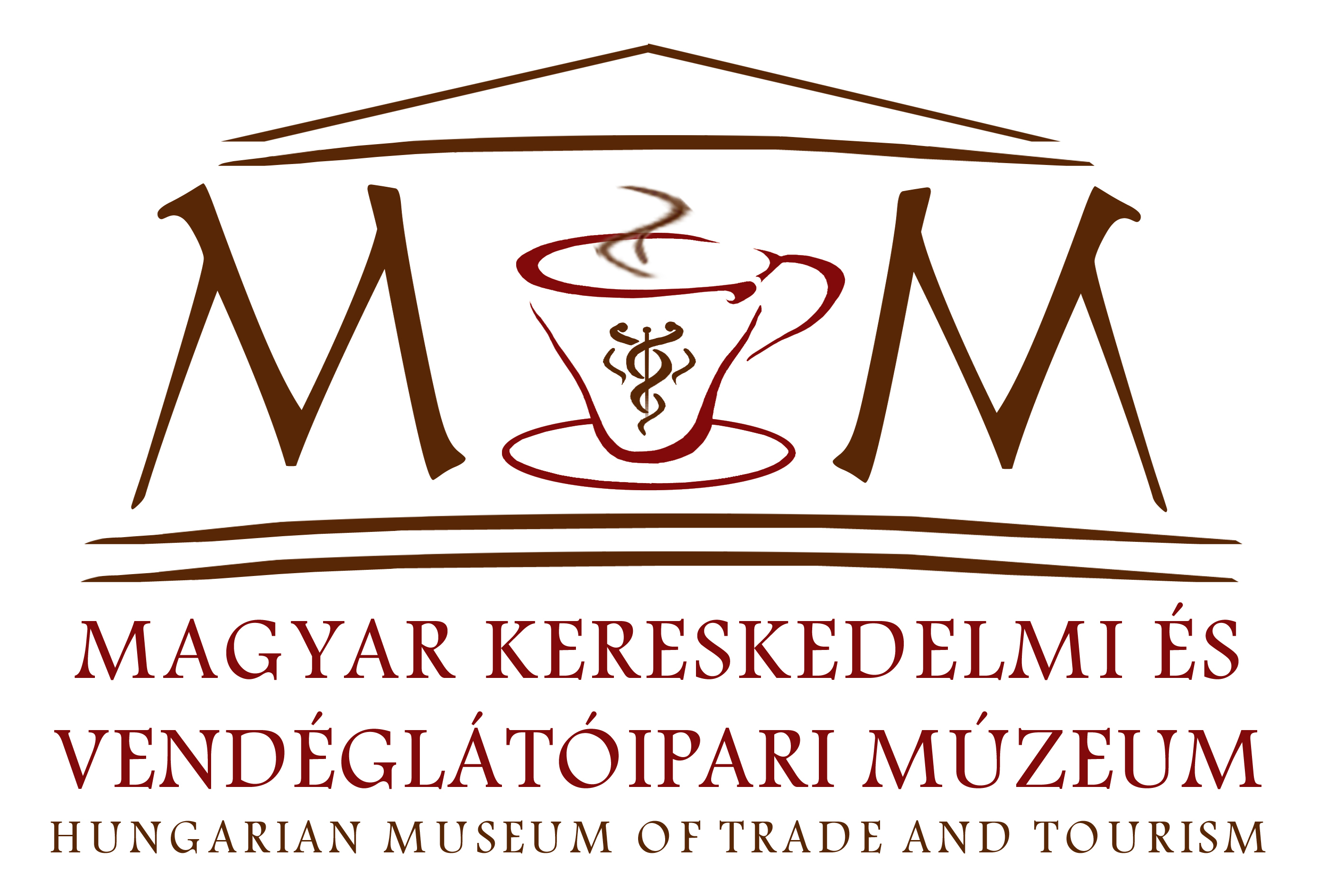 Az MKVM logója